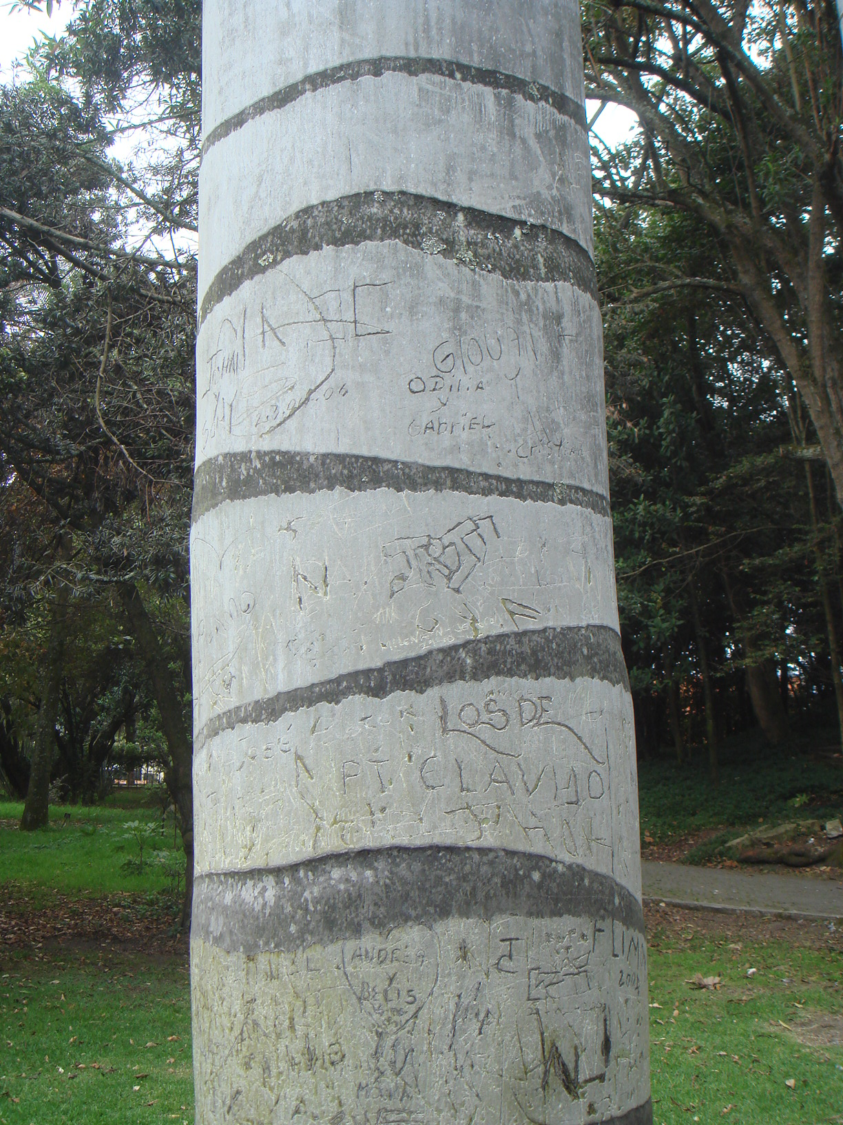 Estípite de palma de cera, Jardín Botánico de Bogota, Colombia.